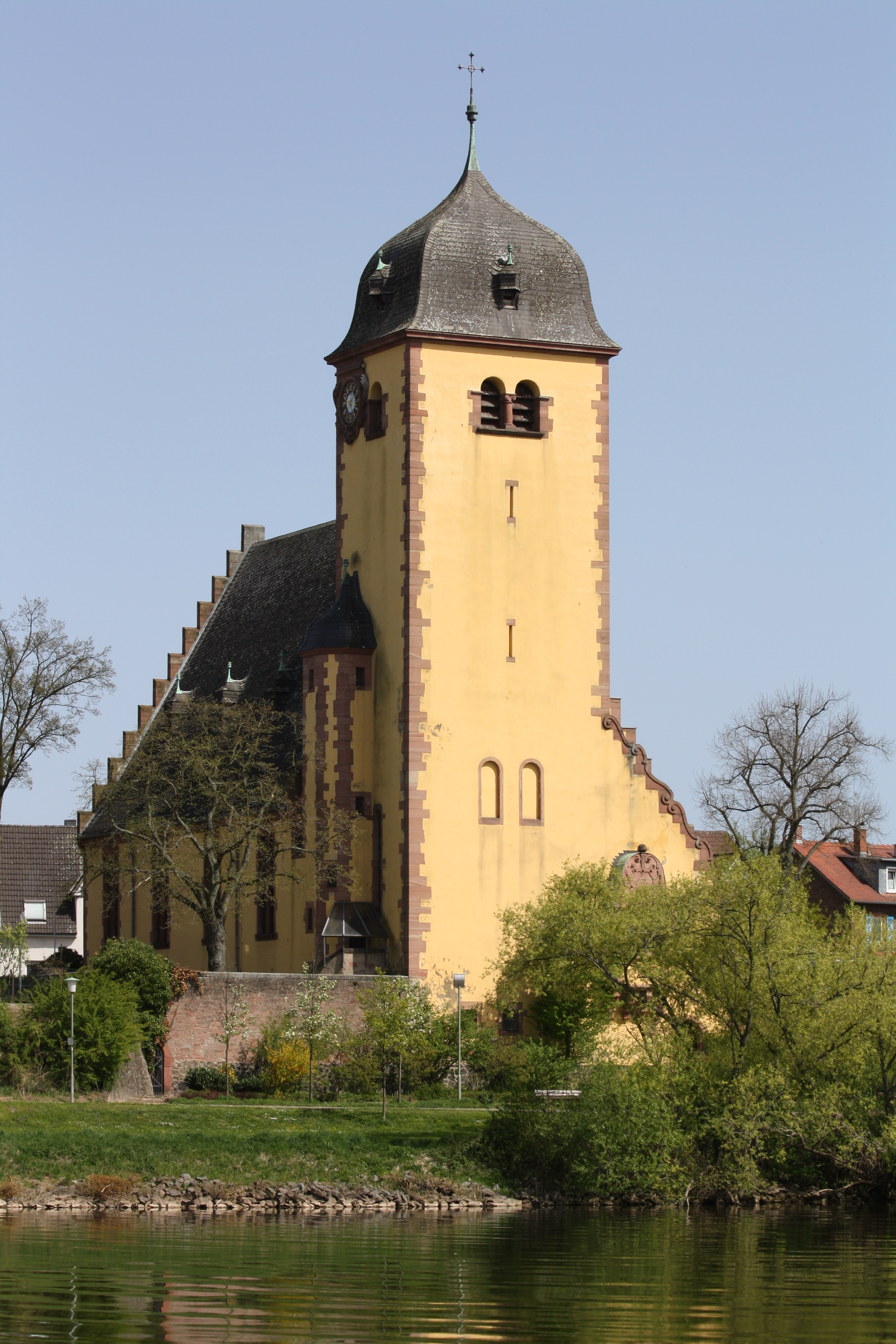 Gustav-Adolf-Kirche (Großauheim), von Südwesten